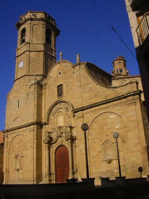 Iglesia parroquial de Seròs